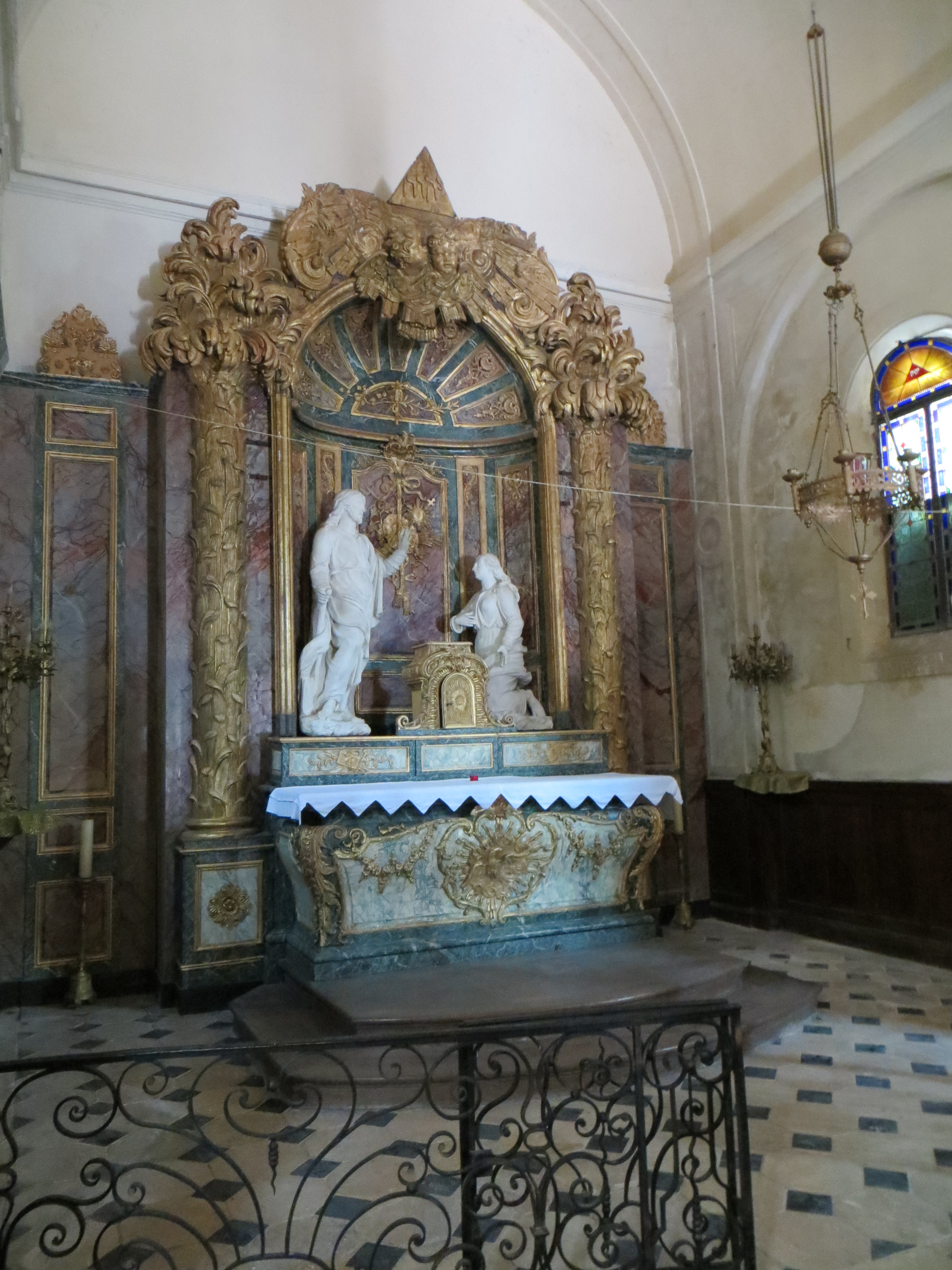 Retable de l'église. XVIIIe siècle, bois polychrome et doré, style Louis XV. Retable acheté par M. Oudot en provenance de l'Hôtel-Dieu de Meaux, détruit en 1846. L'aigle sur le galbe de l'autel est une référence à Bossuet (d'après notice de présentation dans l'église)